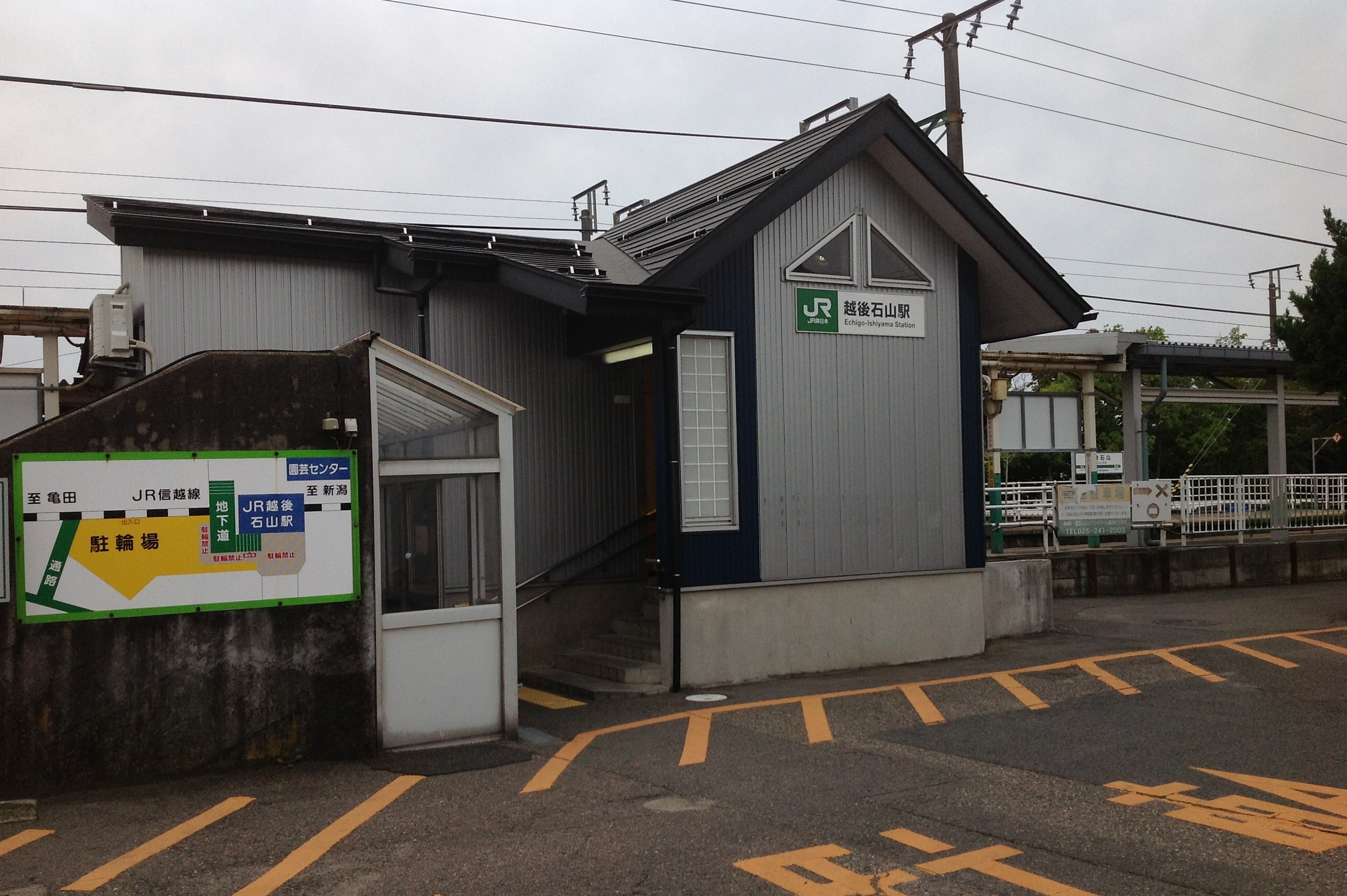 越後石山駅東口